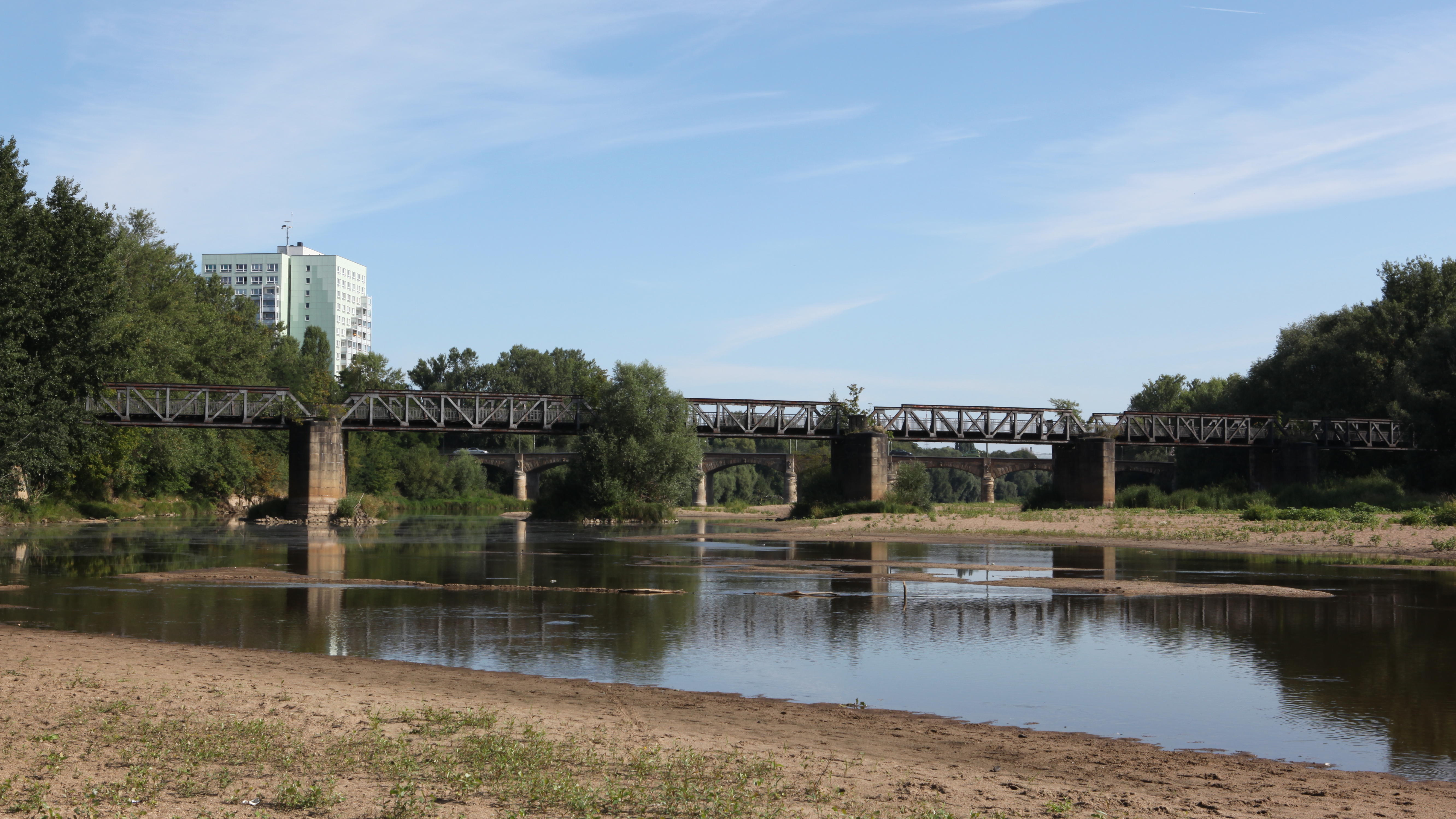 Eisenbahnbrücke über die Alte Elbe in Magdeburg